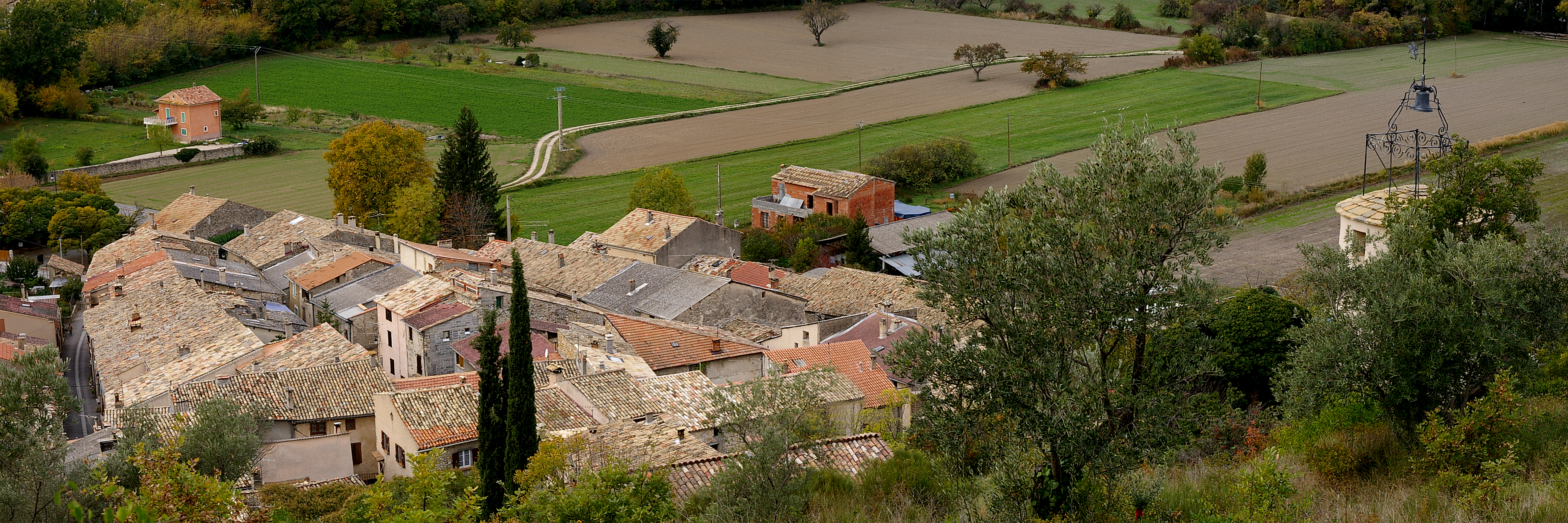 Ancien relais de diligence ( Establo, “petite écurie”) Estoublon a conservé une tour de l'Horloge, classée monument historique.